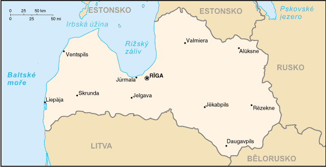 Mapa Lotyšska přeložená z CIA World factbook